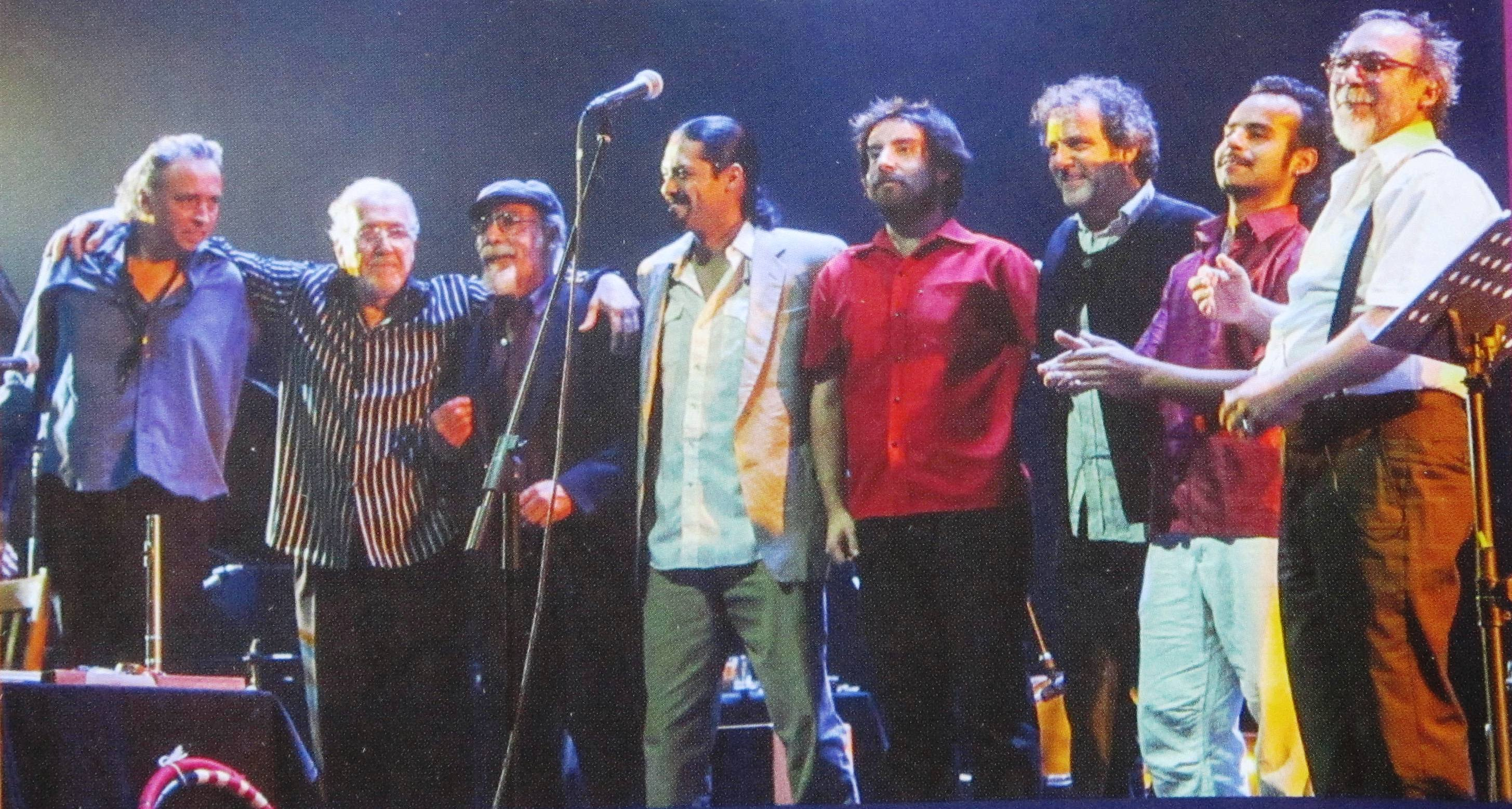 Congreso en el recital "Congreso a la carta" en abril de 2012